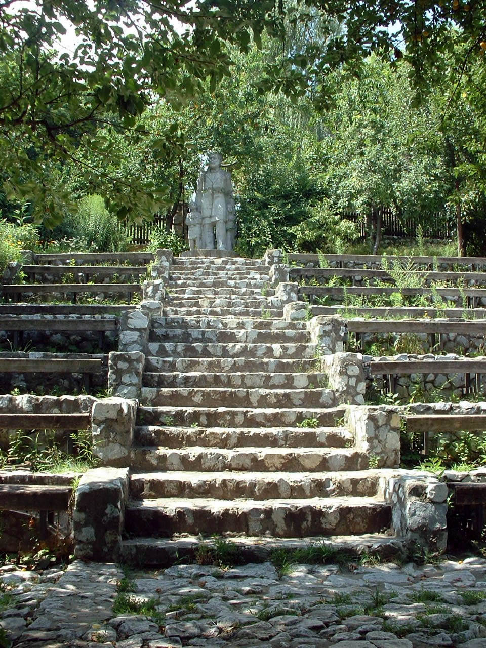 Curtea bojdeucii lui Creanga